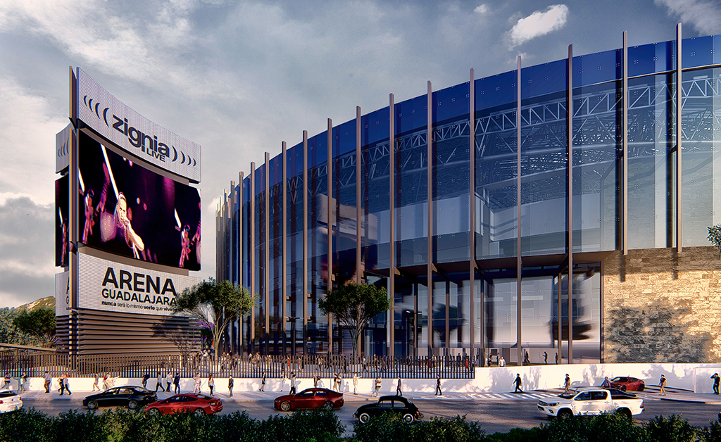 Fachada y tomem de Arena Guadalajara